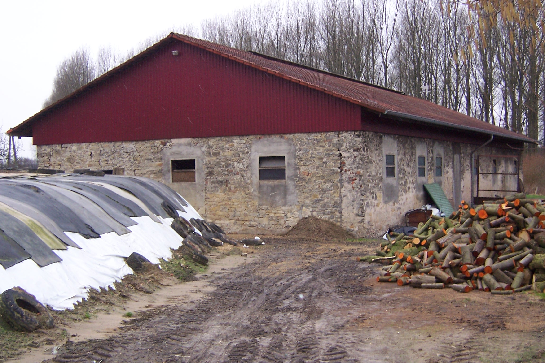 Das Gebäude ist das ehemalige Brauhaus des aufgelösten und überwiegend abgerissenen Klosters Klein-Burlo bei Darfeld, Kreis Coesfeld, NRW.